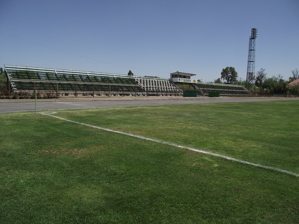 Actual Estadio De Trasandino de Los Andes